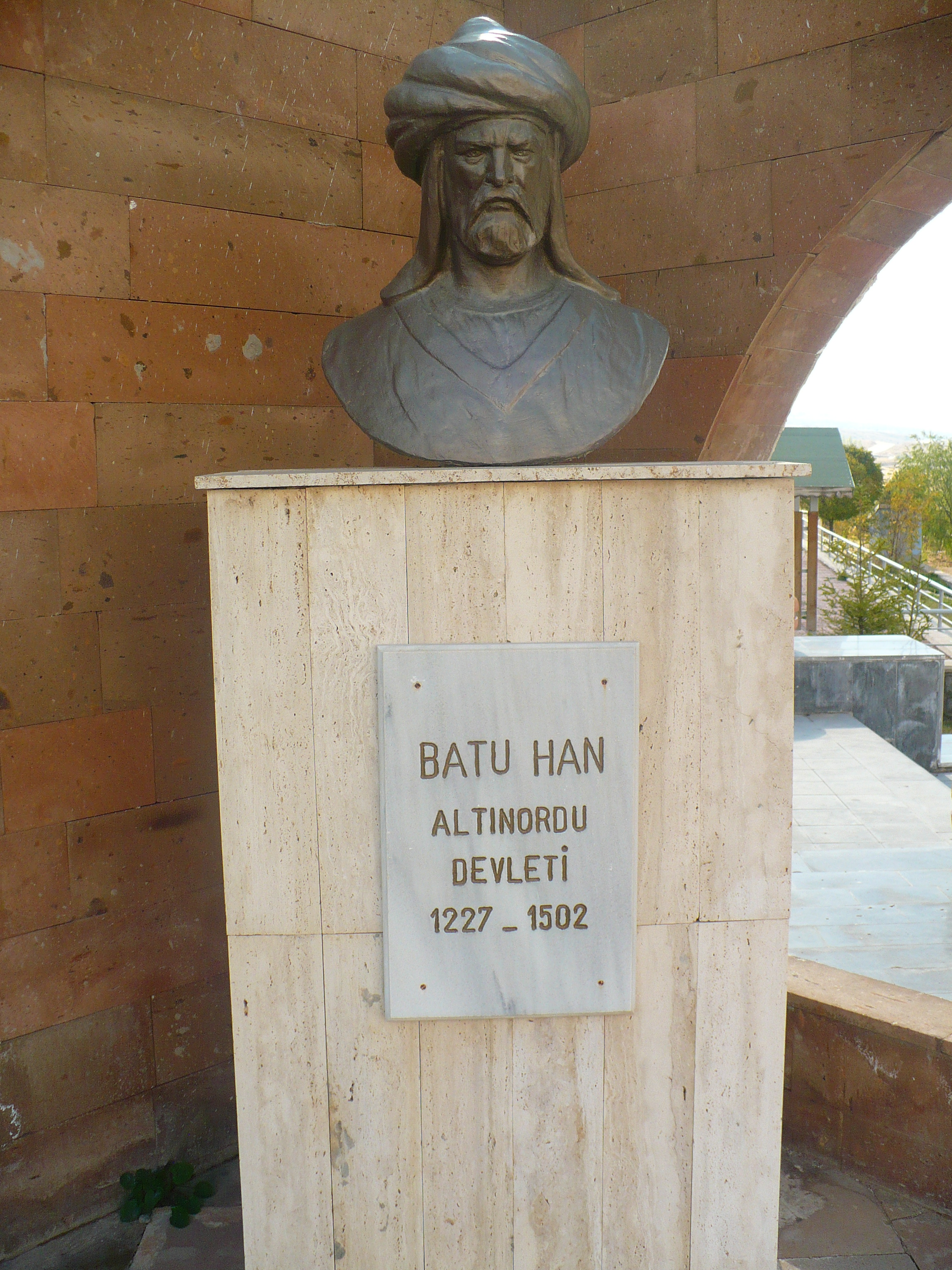 Batu Han'ın heykeli, Kayseri, Pınarbaşı, Türkiye